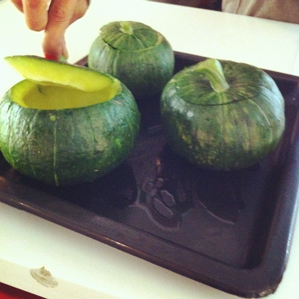 Cucurbita maxima Zapallito group (= subsp. zapallito, = var. zapallito). Preparation for stuffed zapallitos (zapallitos rellenos).